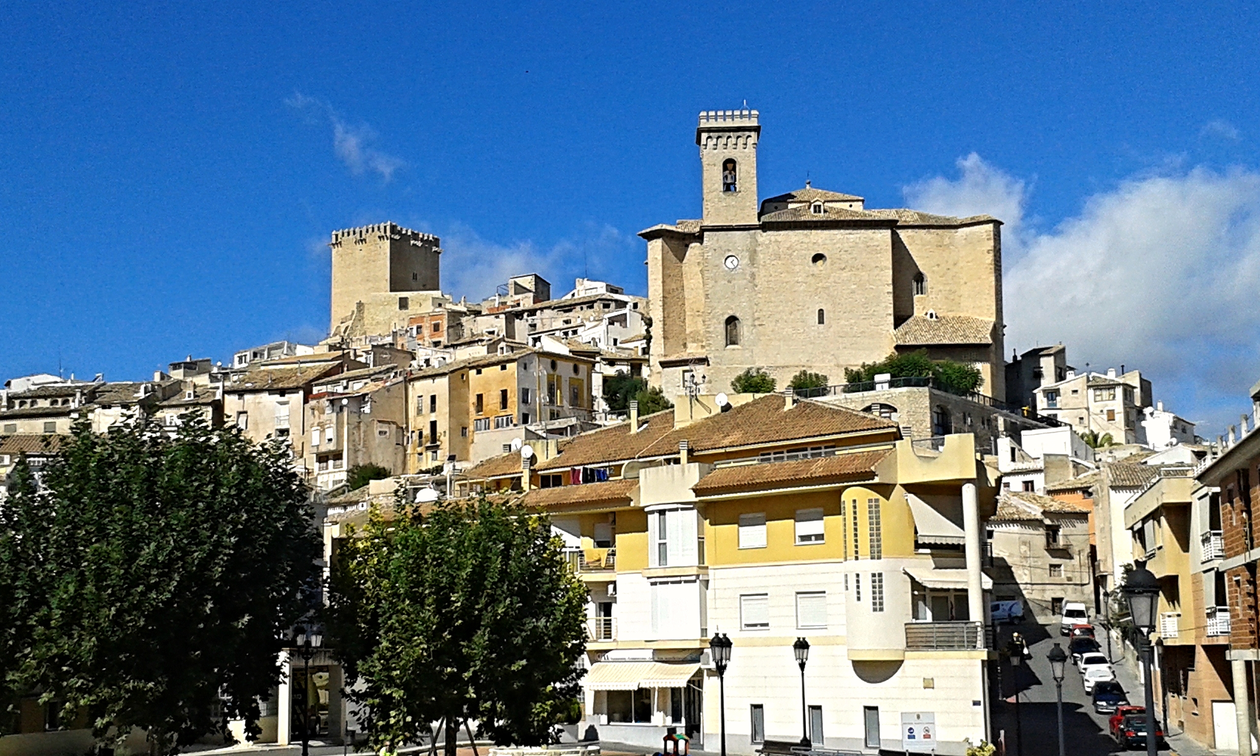 Castillo e Iglesia de Moratalla